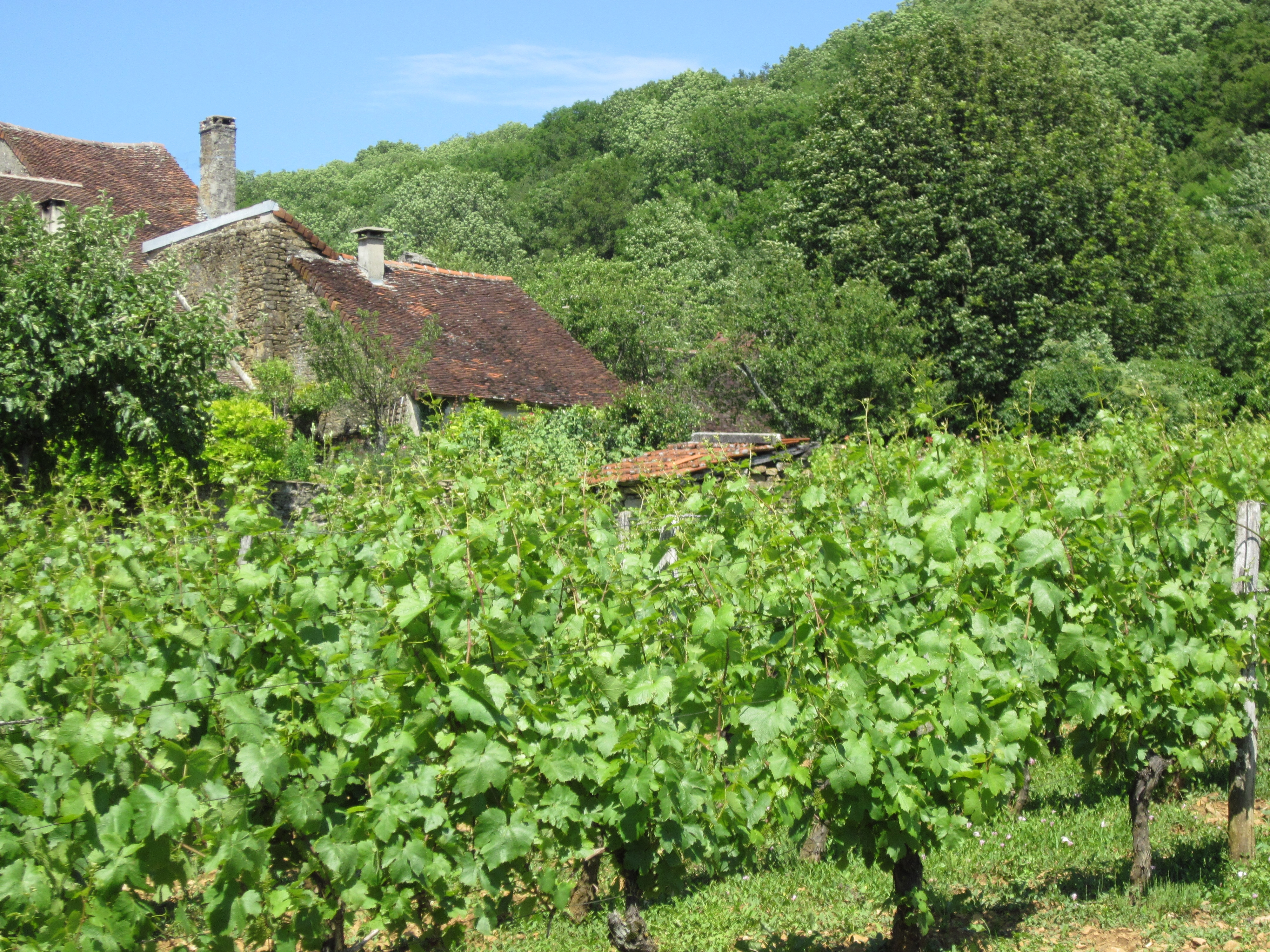 Menétru-le-Vignoble - Vieux toits et vigne (vignoble du Jura)